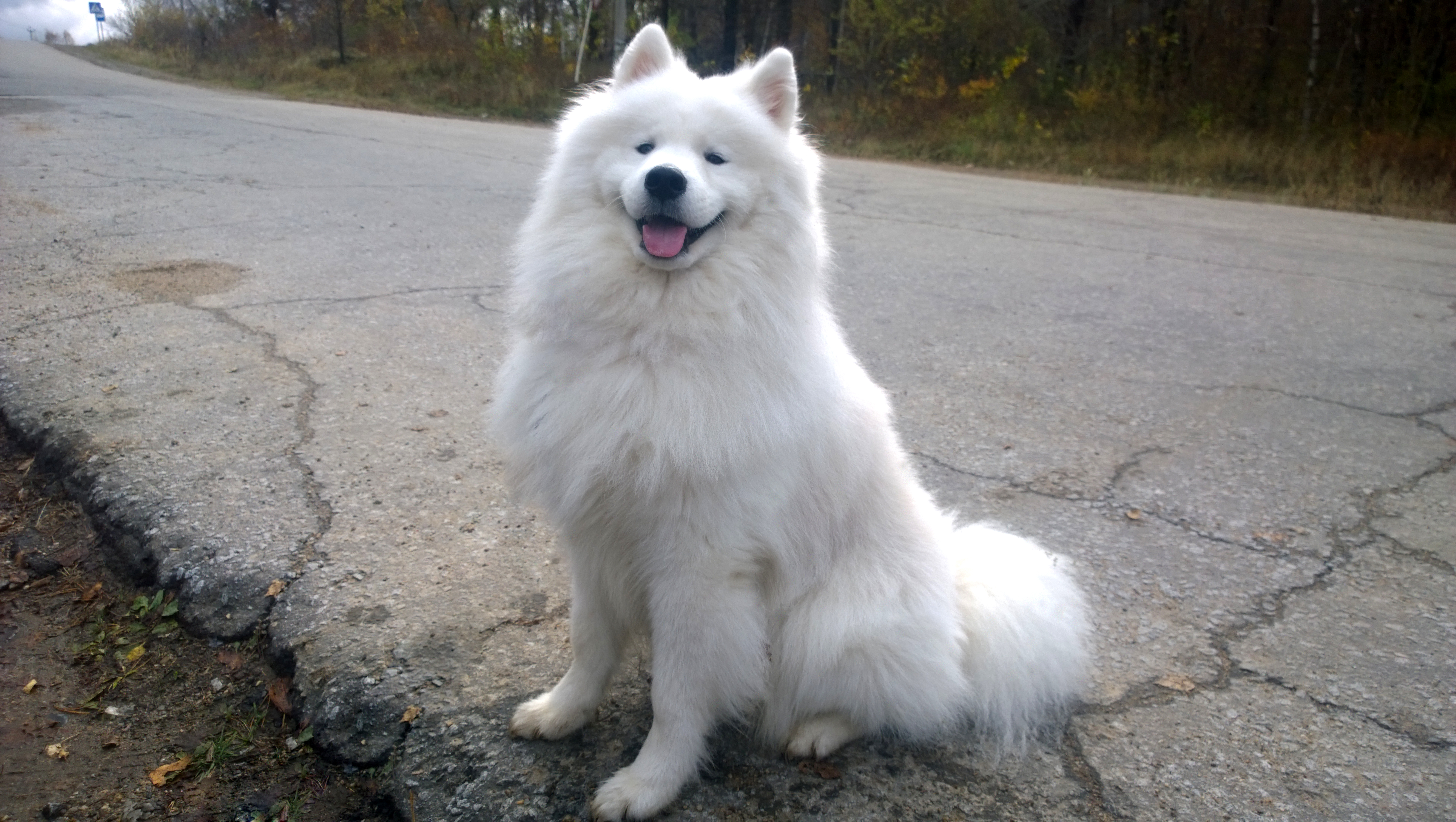 Самоед, Samoyed dog